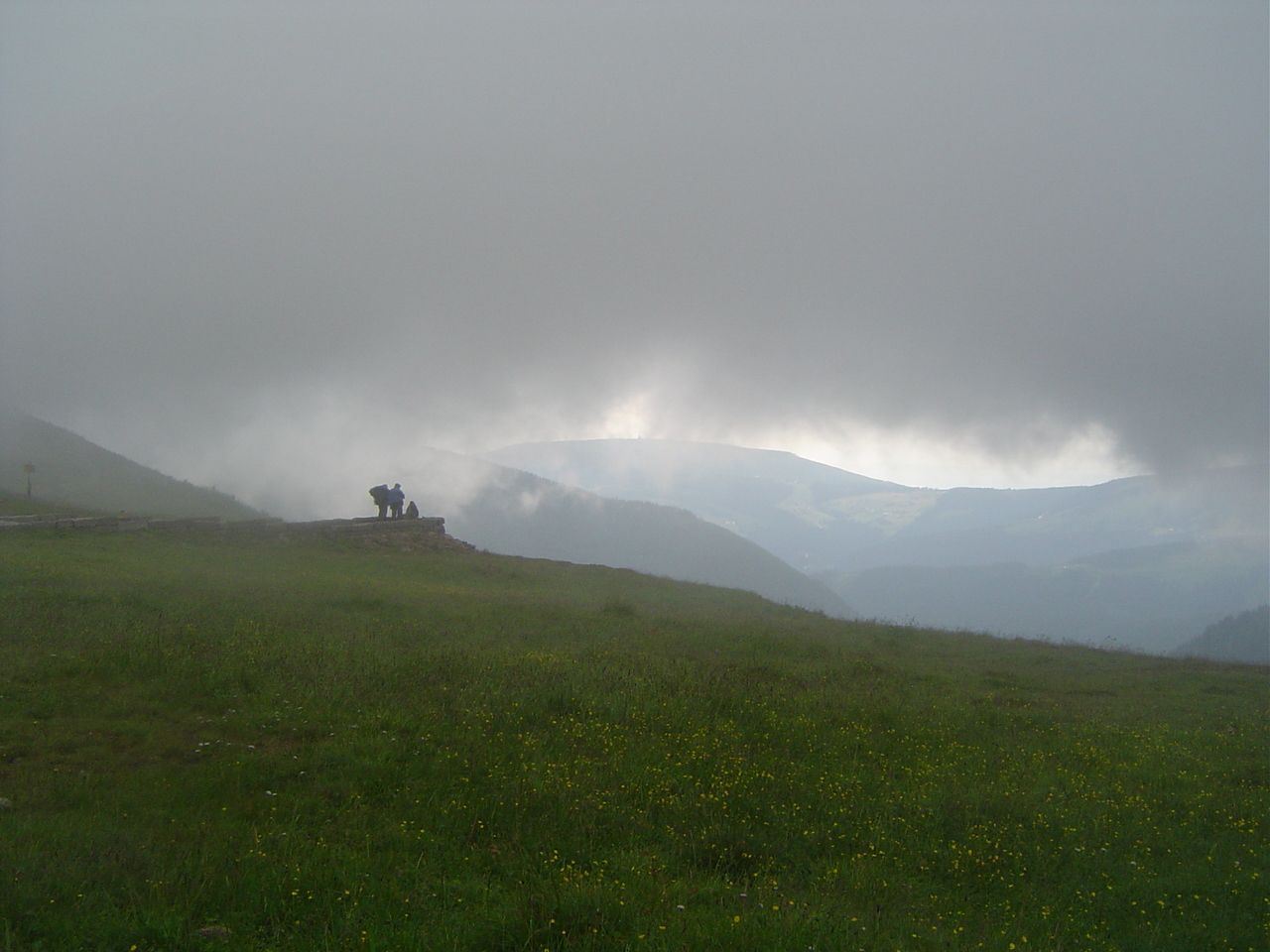 Köd az Óriás-hegységben, a Sněžka alatti fennsíkon felszállt a köd (Csehország)